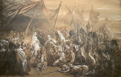 Pierre noire, craie blanche, lavis brun rehauts de blanc - 63 x 96,5 cm Galerie Aaaron Photo : Didier Rykner